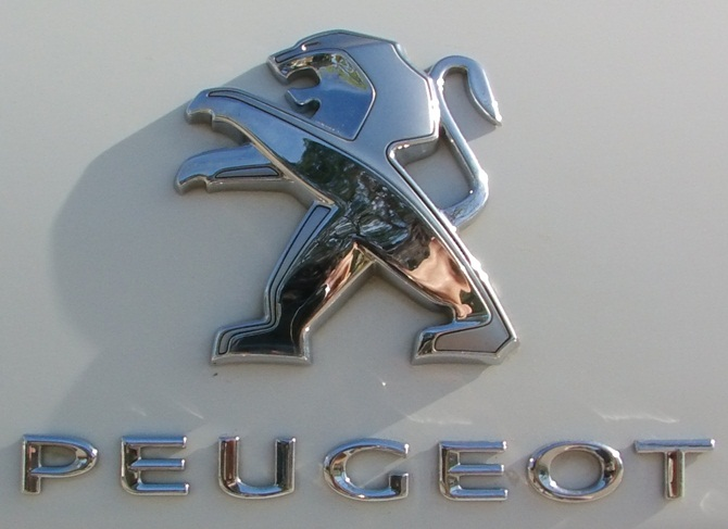 Nuevo Logotipo de Peugeot, en un Peugeot 408